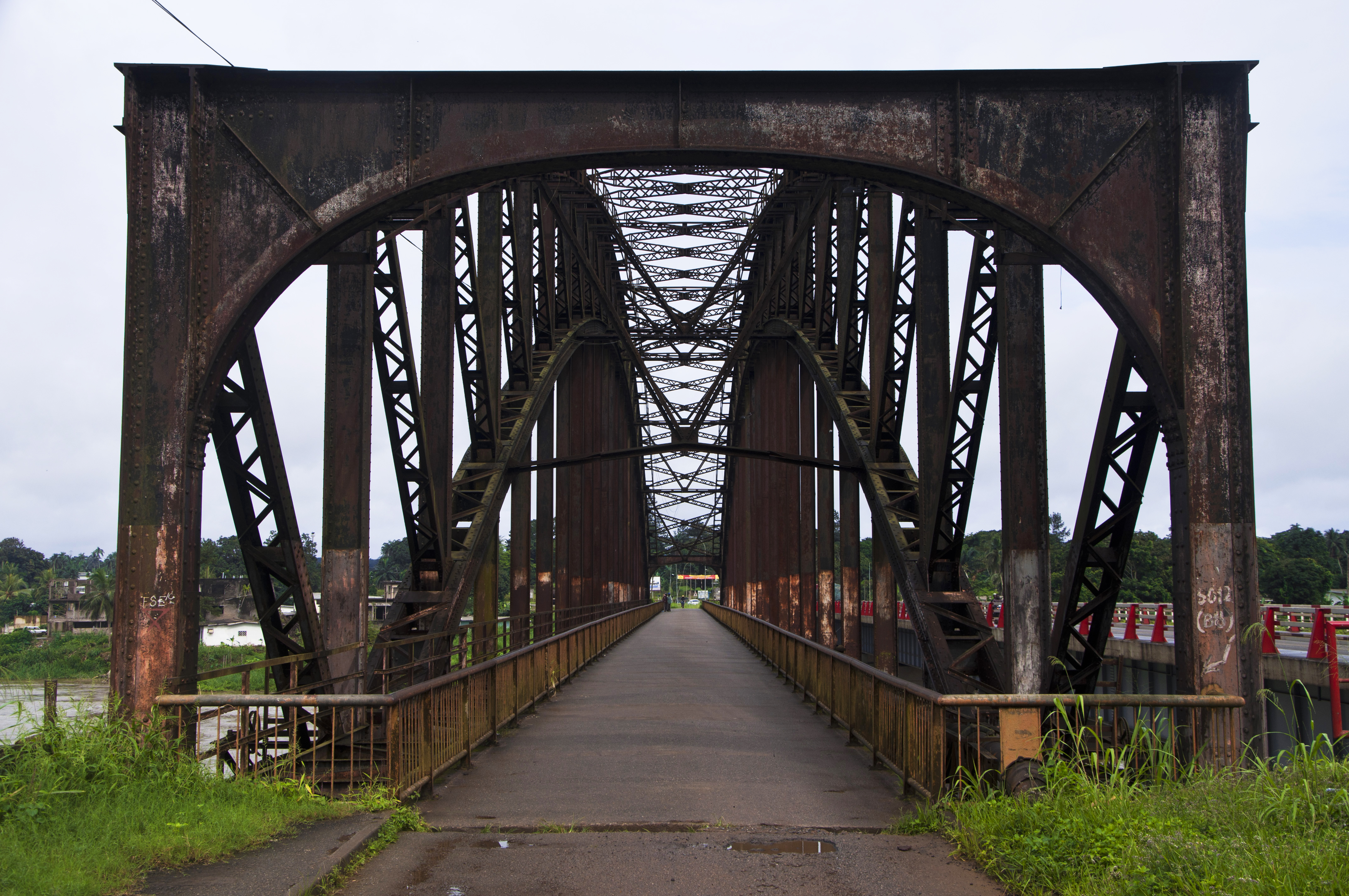 Pont d'édea